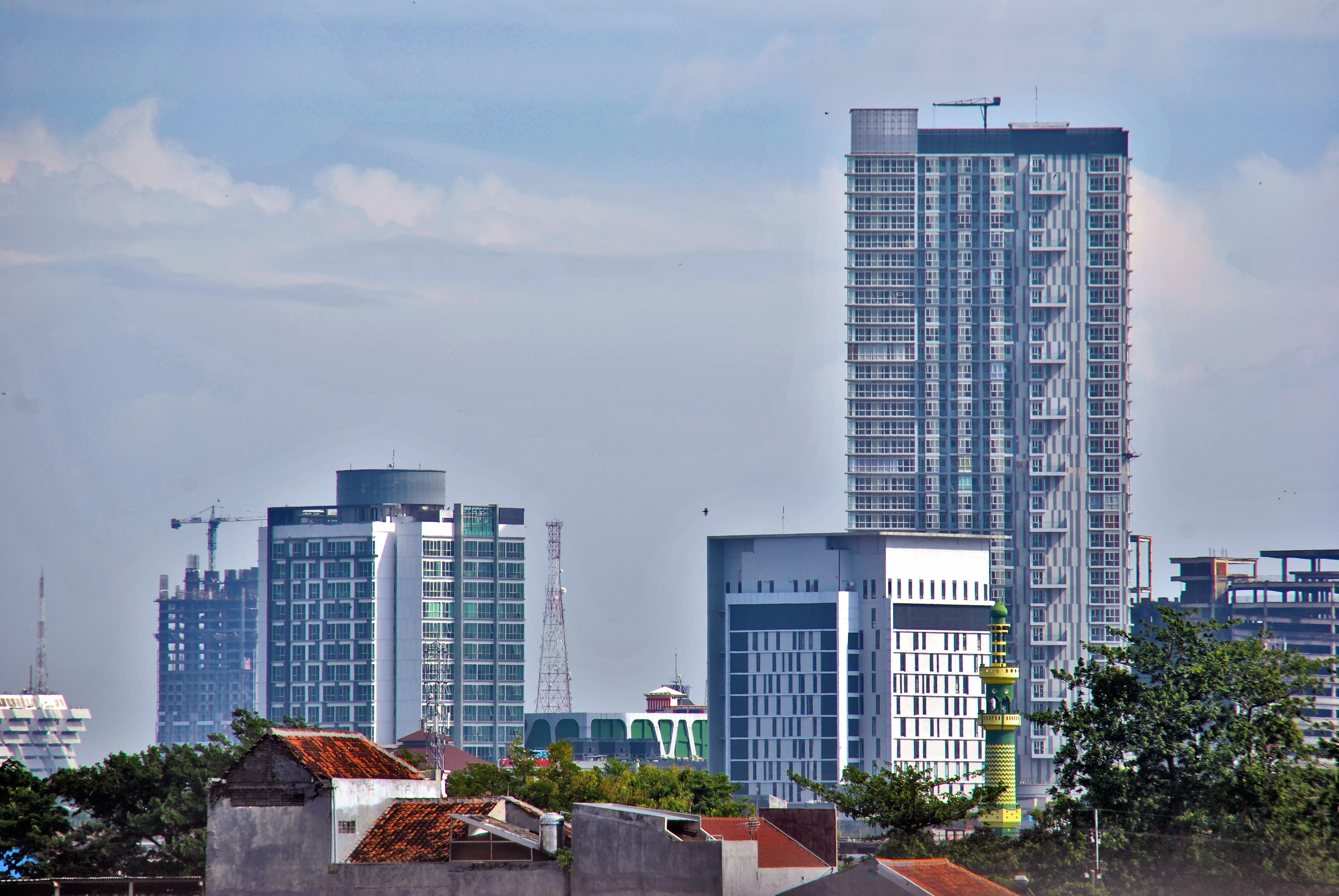 Superblock in Ngagel, Surabaya. See annotation for detail Kawasan superblok di Ngagel, Surabaya. Lihat anotasi.